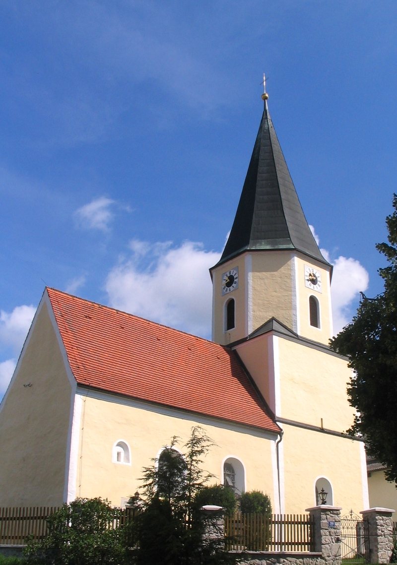 Neustadt an der Donau, Ortsteil Sittling: Kirche St. Ulrich und Wolfgang